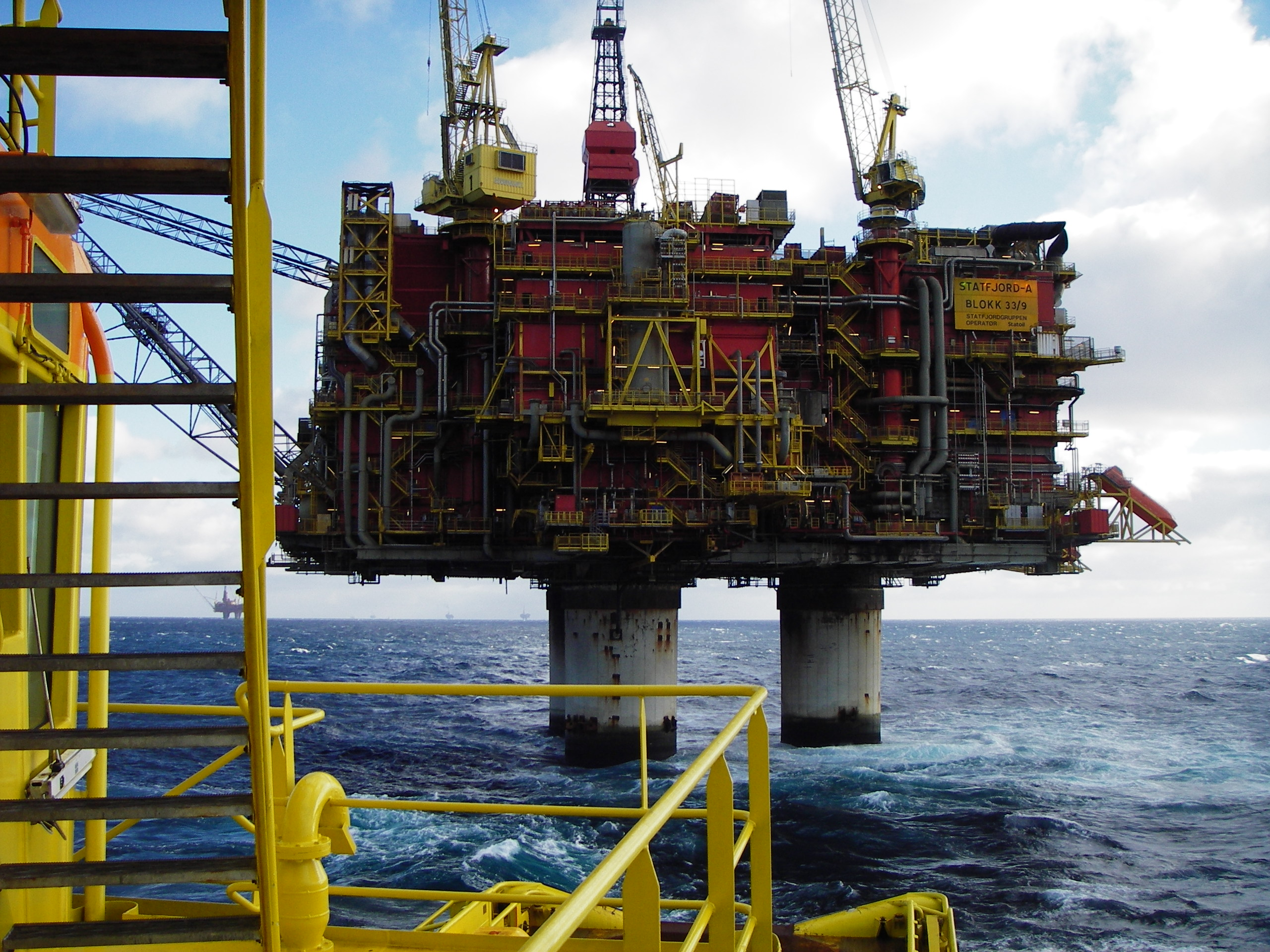 Norwegian oil rig Statfjord A